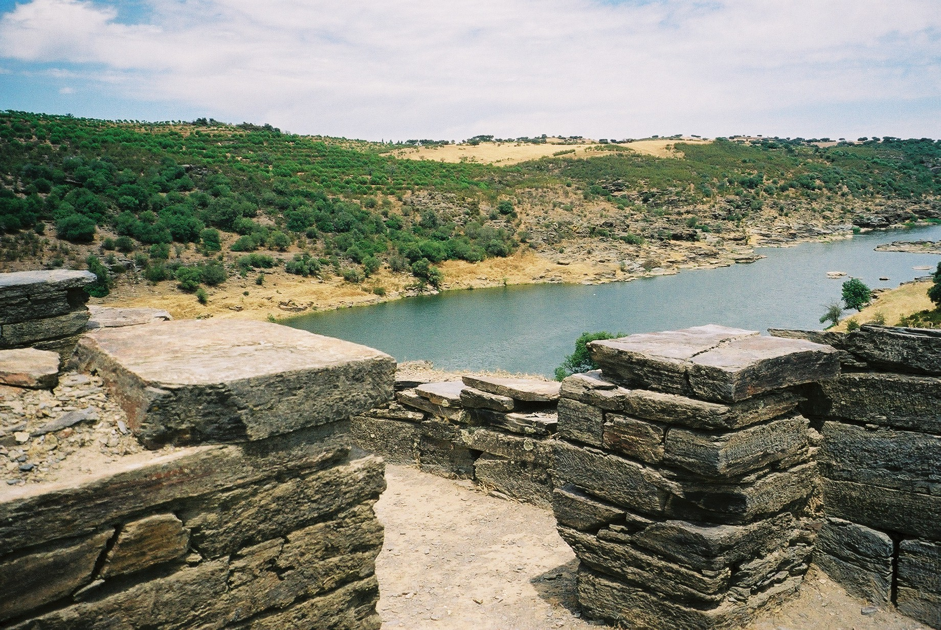 Castelo da Lousa, freguesia de Nossa Senhora da Luz, Concelho de Mourão, Distrito de Évora, em Portugal.